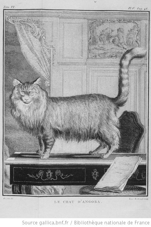 Le Chat d'Angora, illustration de Histoire naturelle générale et particulière avec la description du cabinet du roy, tome VI, Georges Louis Leclerc, comte de Buffon